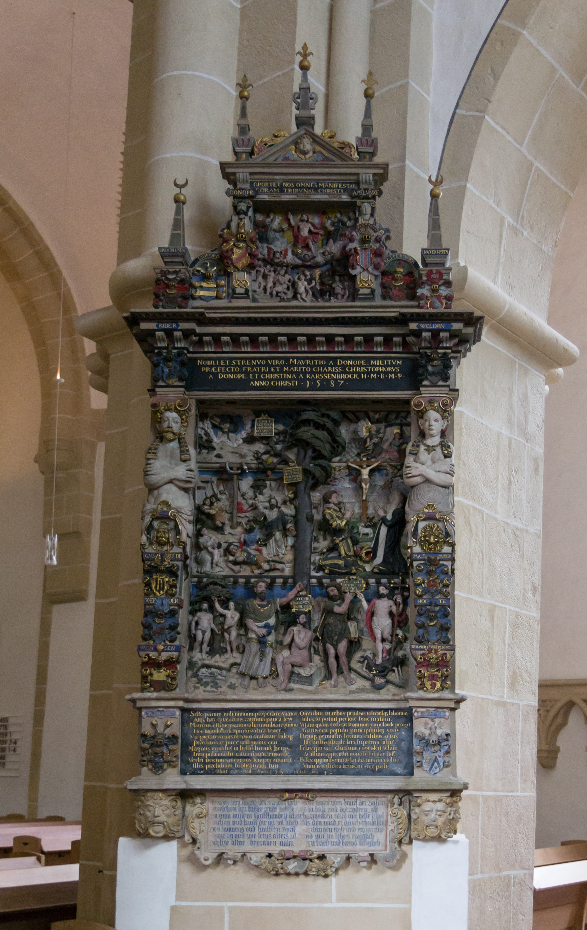 This image shows a heritage building in Germany, located in the North Rhine-Westphalian city Lemgo. Evangelisch-lutherische Kirche St. Nicolai in Lemgo; Epitaph für Moritz von Donop, erstellt von Georg Crosmann (1587)